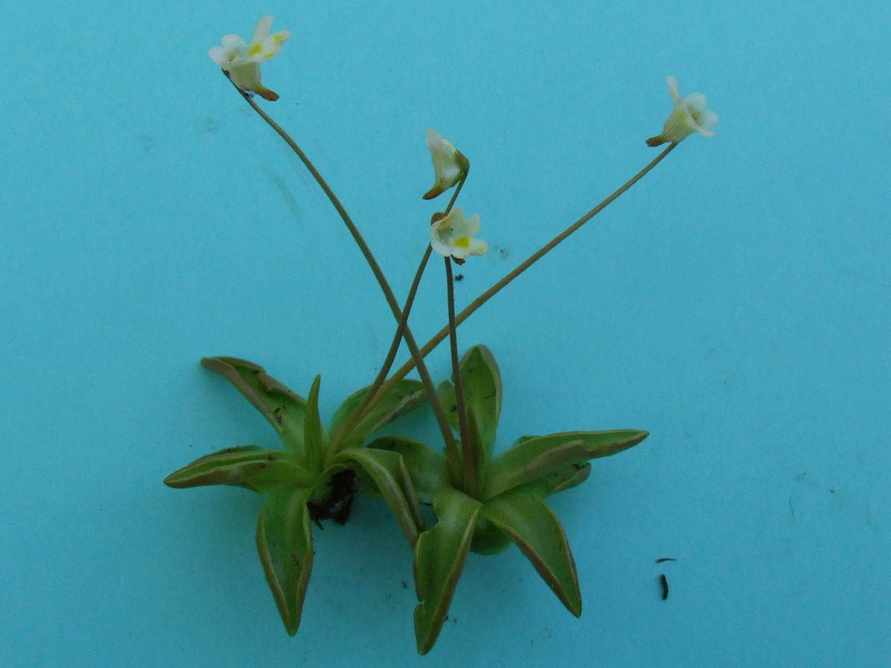 Pinguicula alpina